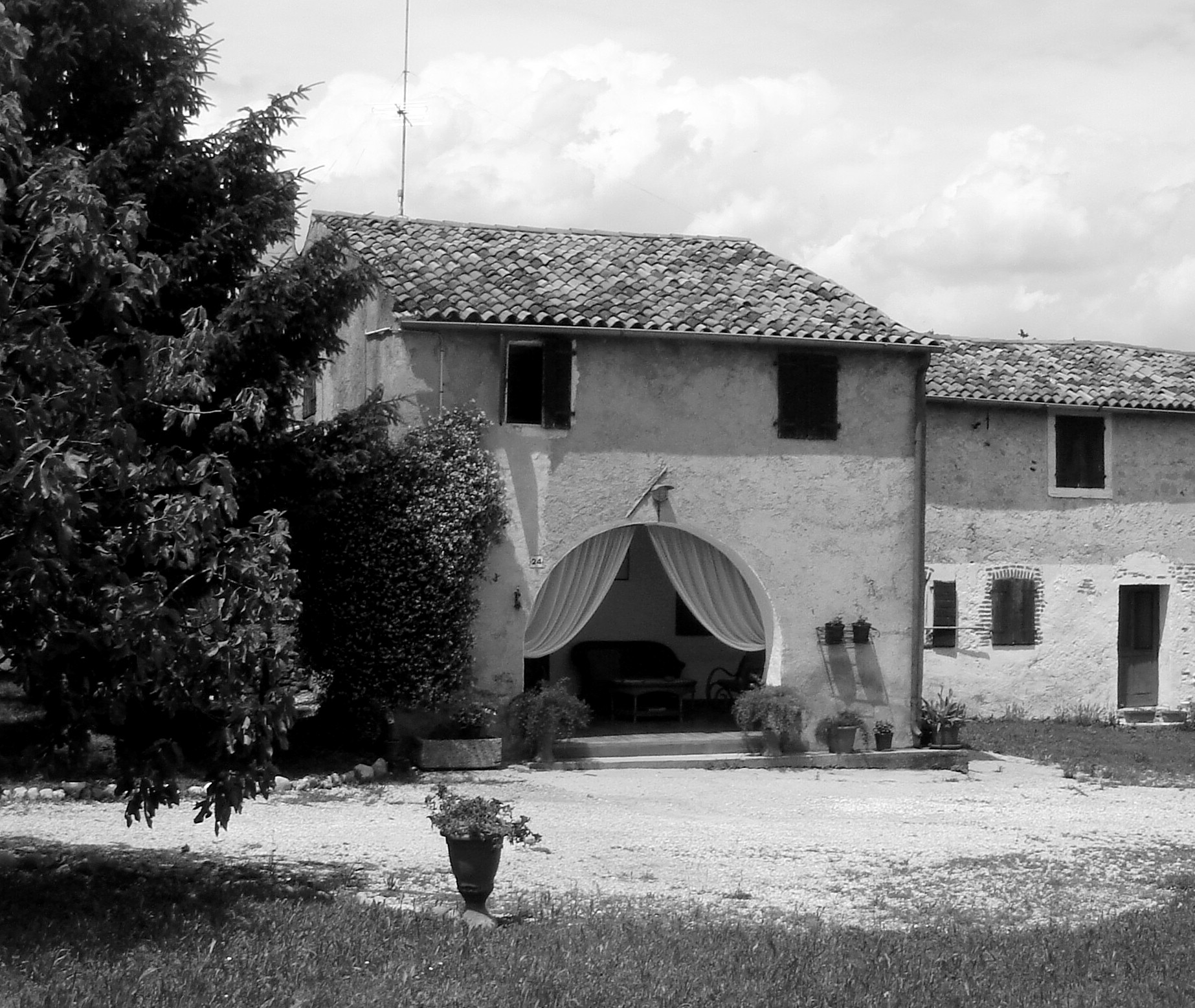 Castello Roganzuolo (San Fior, Treviso, Italia): prospetto principale della casa rurale di via Gardin, col portico dell'abitazione che dà su quel che resta dell'originaria aia: i restanti due lati di questa, infatti, sono stati oggetto di speculazione edilizia negli anni 2000, compromettendo irrimediabilmente il secolare assetto dell'acquitrinosa e fertile area agricola.